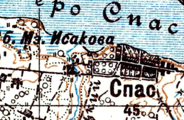 Топографическая карта Ленинградской области, квадрат VIc-26 (Ставотино), деревня Спас-Которск